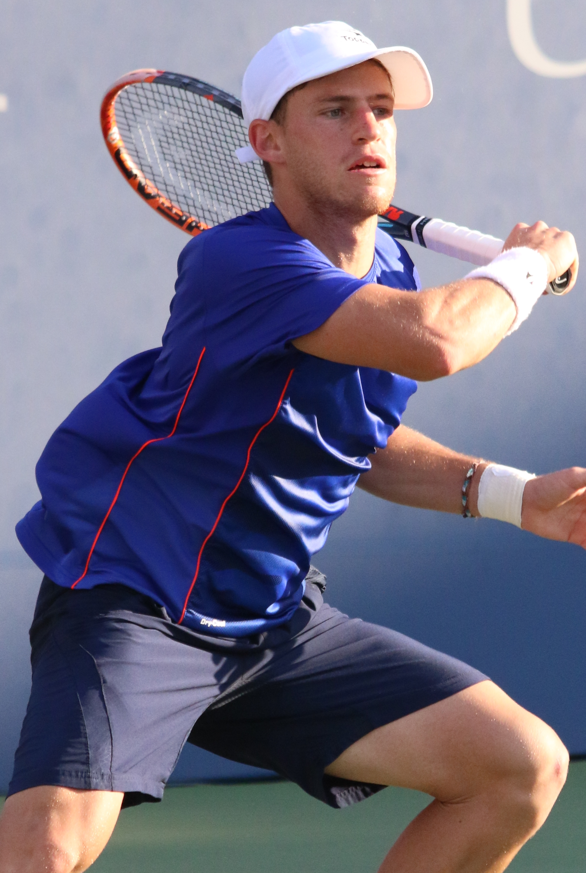 Schwartzman US16 (32)